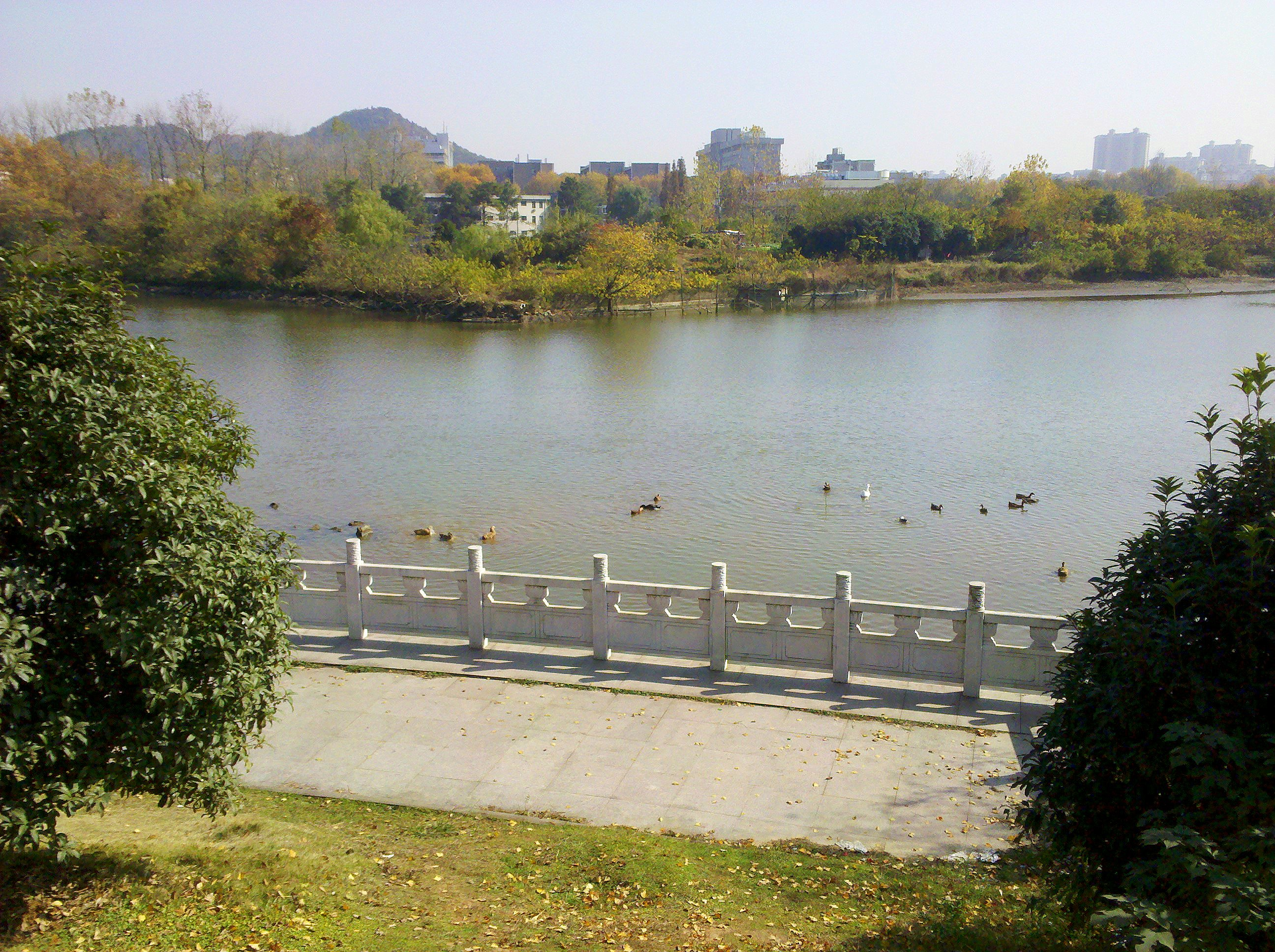 Hongshan, Wuhan, Hubei, China